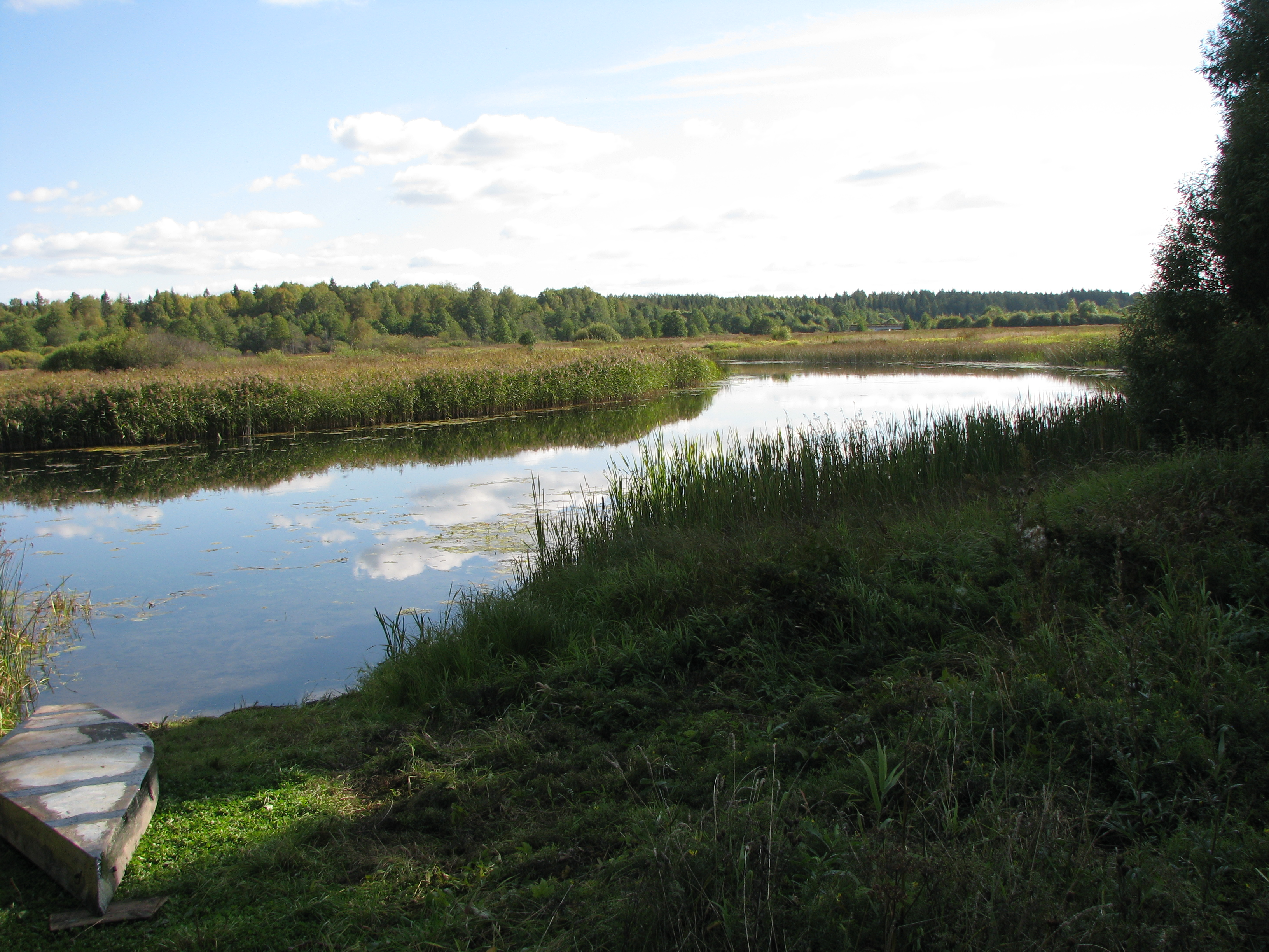 Река Люлех в деревне Волокобине